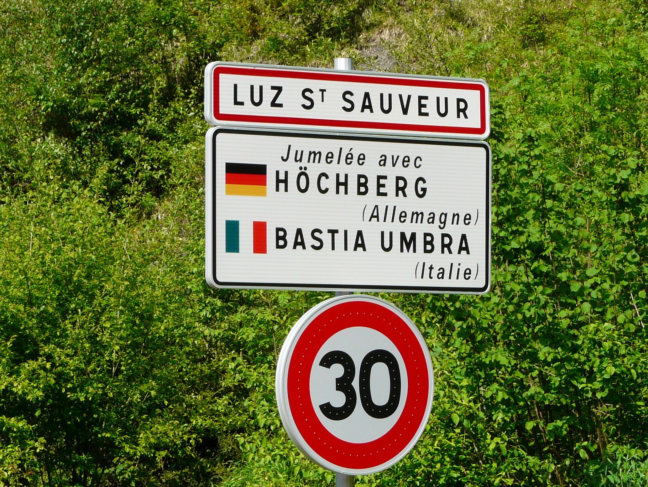 Panneau d'entrée à Luz-Saint-Sauveur, Hautes-Pyrénées, France.